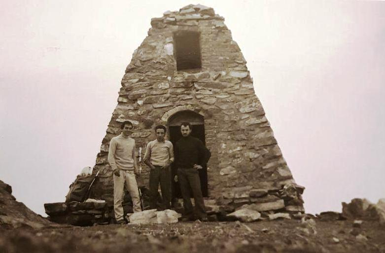 تصویر قدیمی (۱۳۵۲) از اسپیدکمر، نخستین جان‌پناه کوه‌نوردی ایران